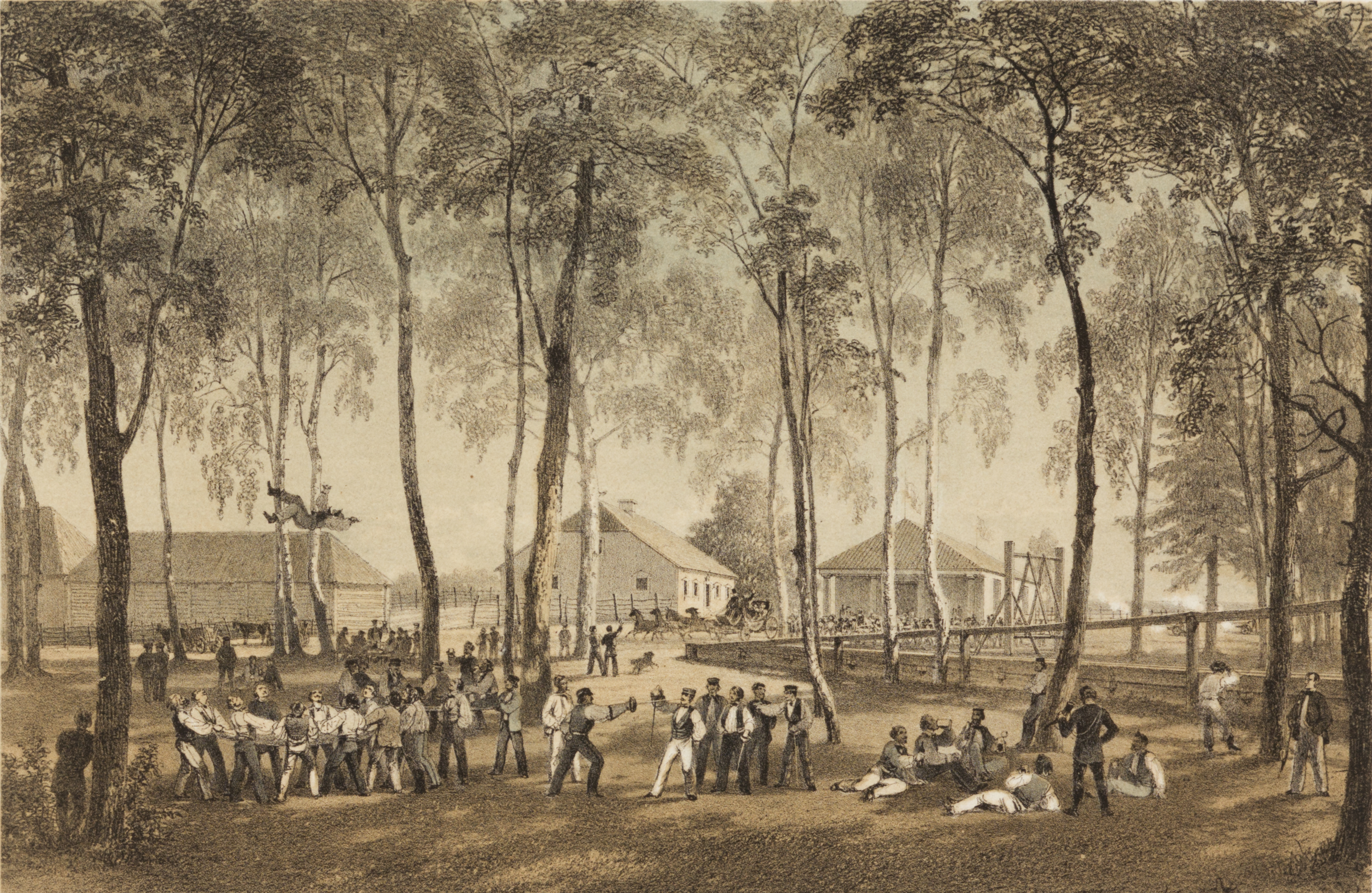 Tartu album. Möllatsi. MUIS: TKM TR 4038 H 31:19